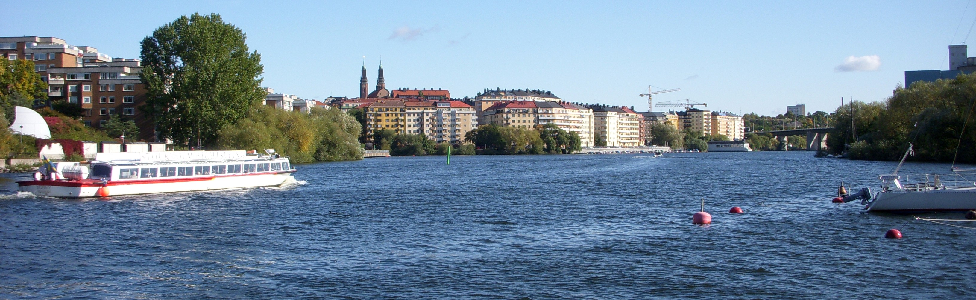 Liljeholmsviken mellan Reimersholme/Södermalm och Liljeholmen, vy mot öst